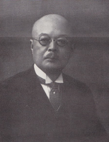 この写真は、藍川清成（1872-1948）の肖像写真です。